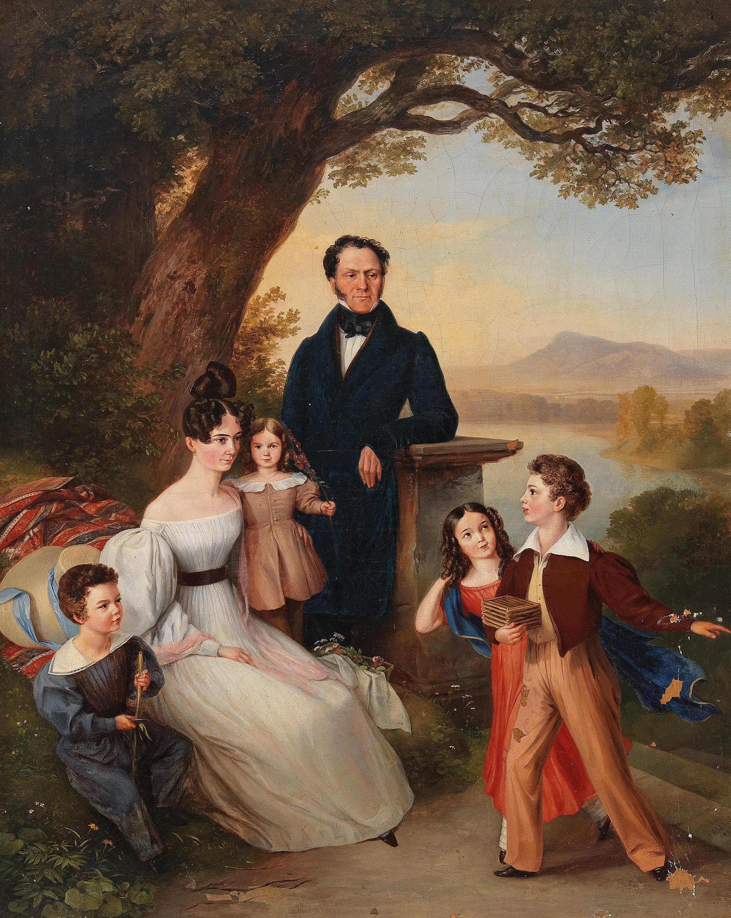 Carl Baron Cerrini de Monte Varchi (* 1779) mit seiner Familie, signiert, datiert Johann C. Fischbach 1832, Öl auf Leinwand, 53 x 42 cm